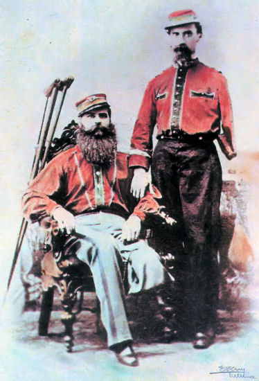 Garibaldisták: Dunyov István ezredes (ülve) és Achille Majocchi ezredes (korabeli ábrázolás)